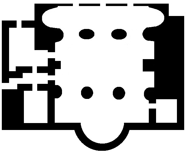 Plan de l'église Notre-Dame de la Libération à Besançon (Doubs, France).